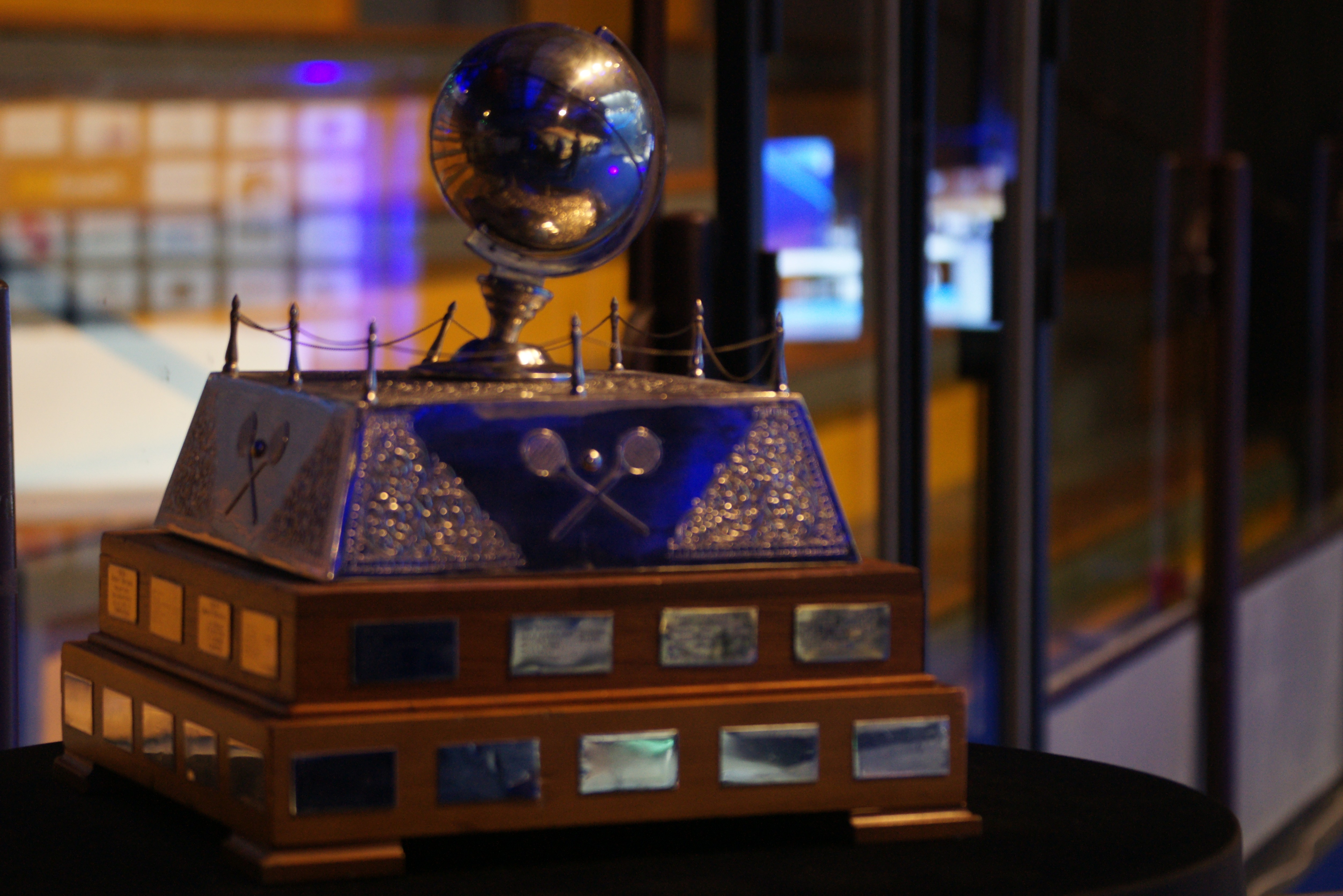 championnats du monde de squash par équipe Marseille 2017